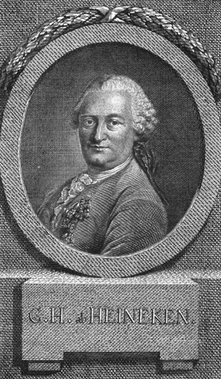 Frontispiz aus Neue Bibliothek der schönen Wissenschaften und freyen Künste, Band 26,1.